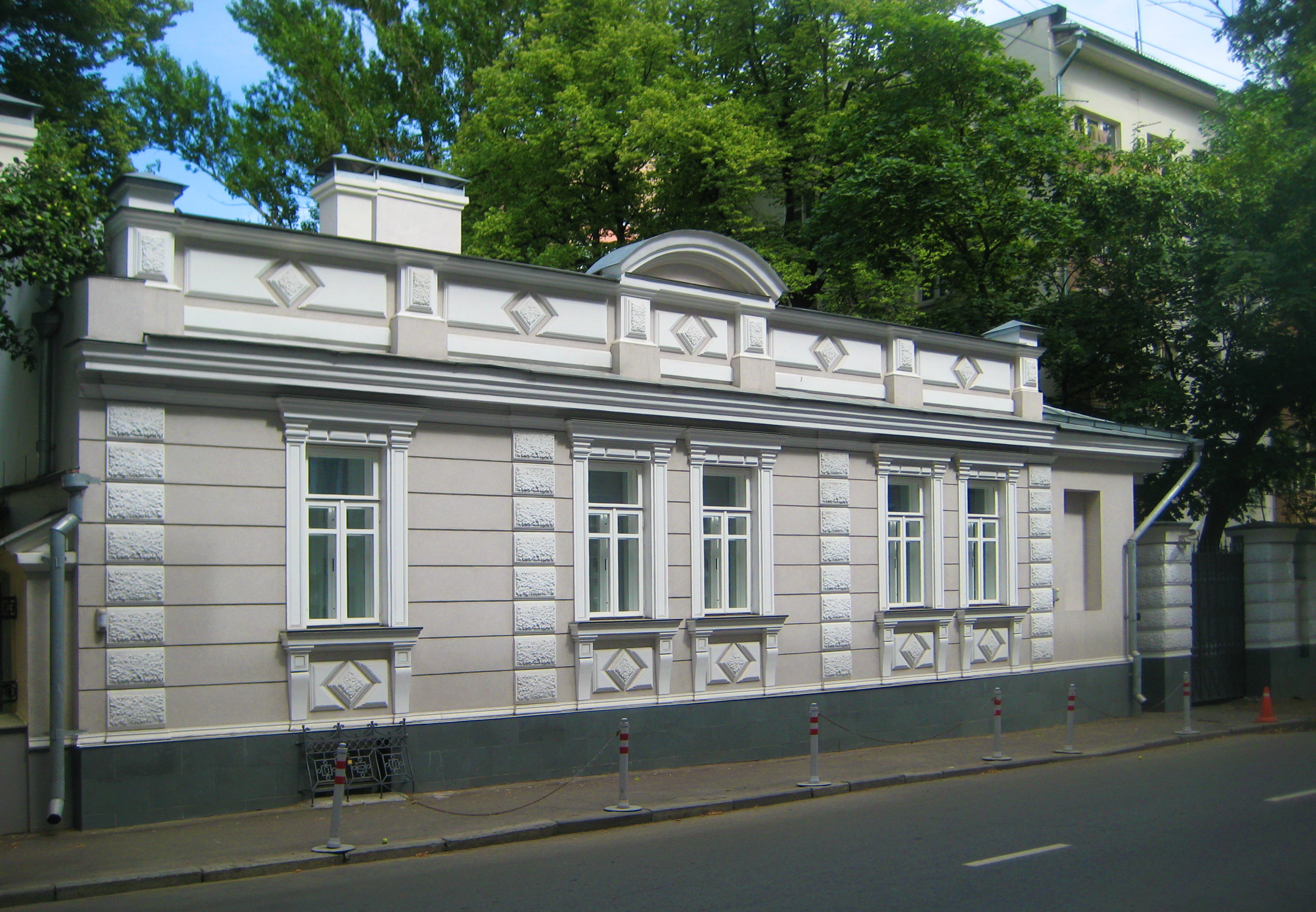 Кропоткинский переулок. № 24, строение 1 — в этом доме в 1870-х гг. жил выдающийся врач-психиатр Сергей Сергеевич Корсаков (1854—1900).